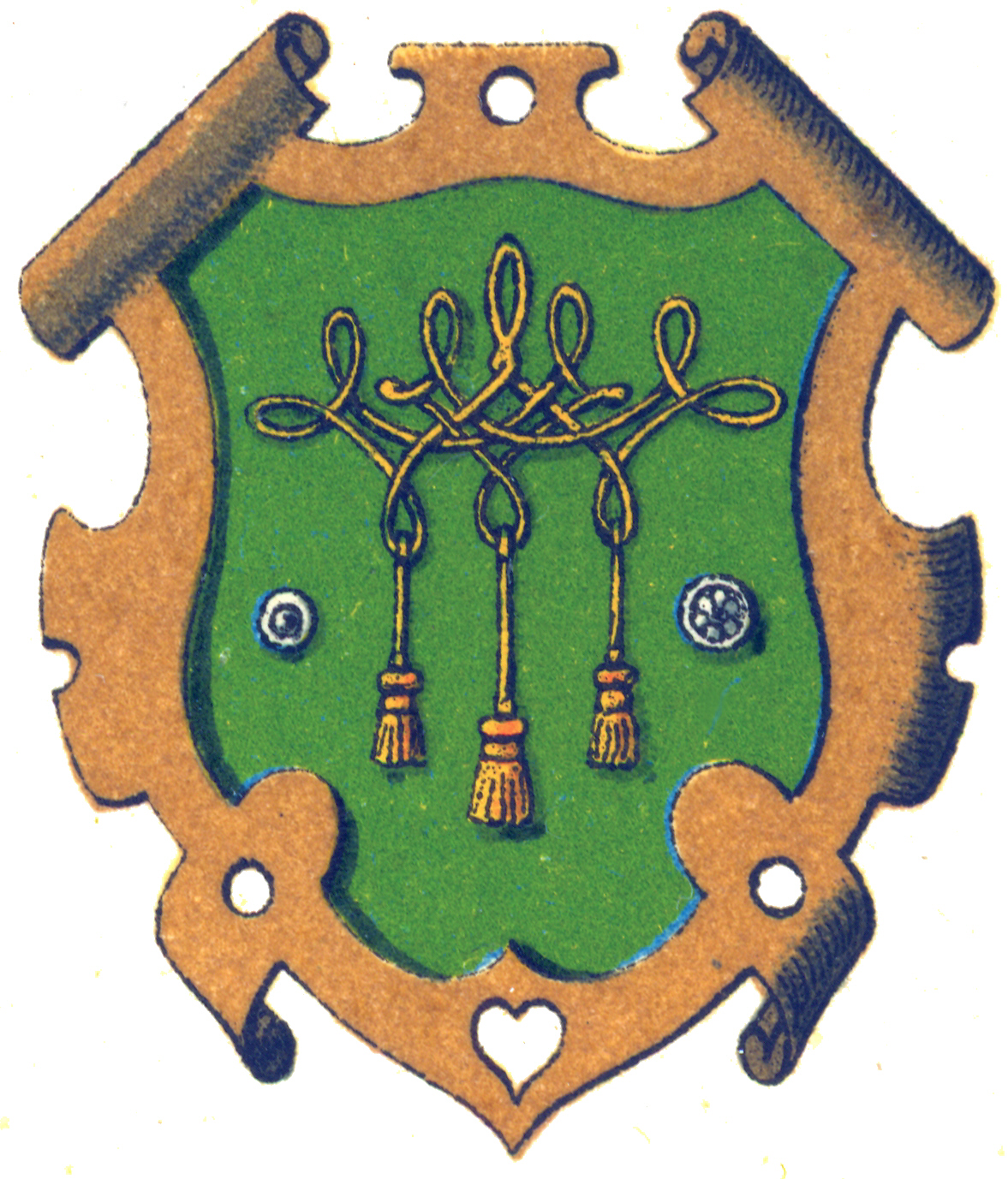 Zunftwappen Knopfmacher